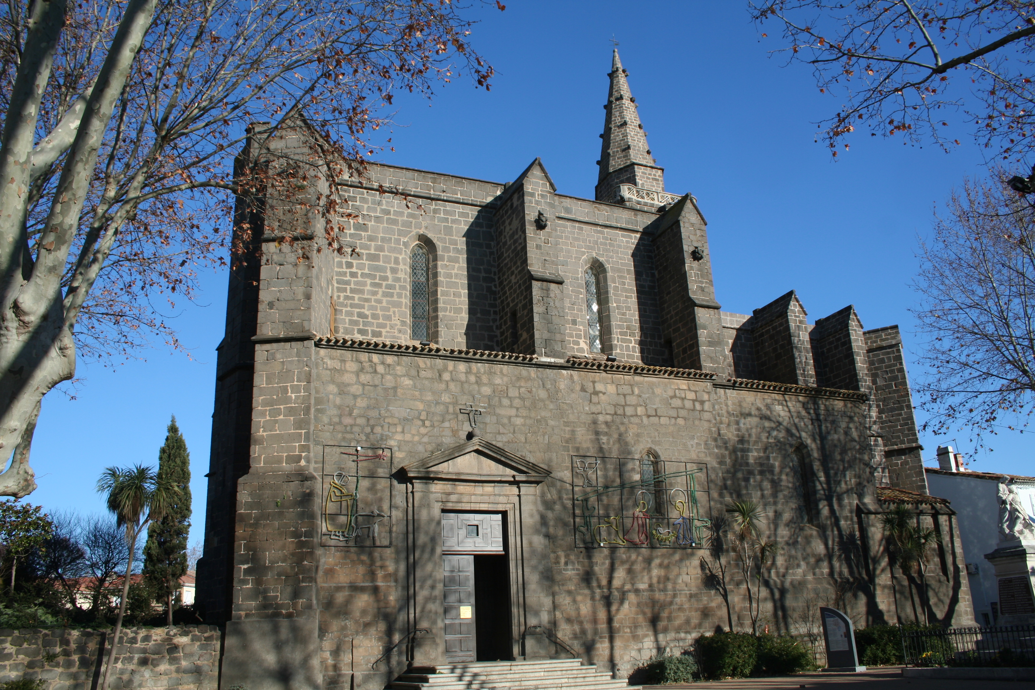 Vias (Hérault) - Façade sud de l'église Saint-Jean-Baptiste (XIVe - XVe siècles).